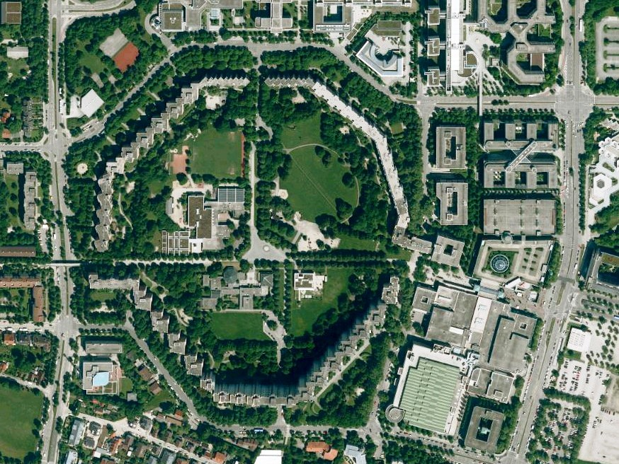 Luftaufnahme der Bayerischen Vermessungsverwaltung: Wohnanlage Neuperlach-Zentrum in München, Bayern.